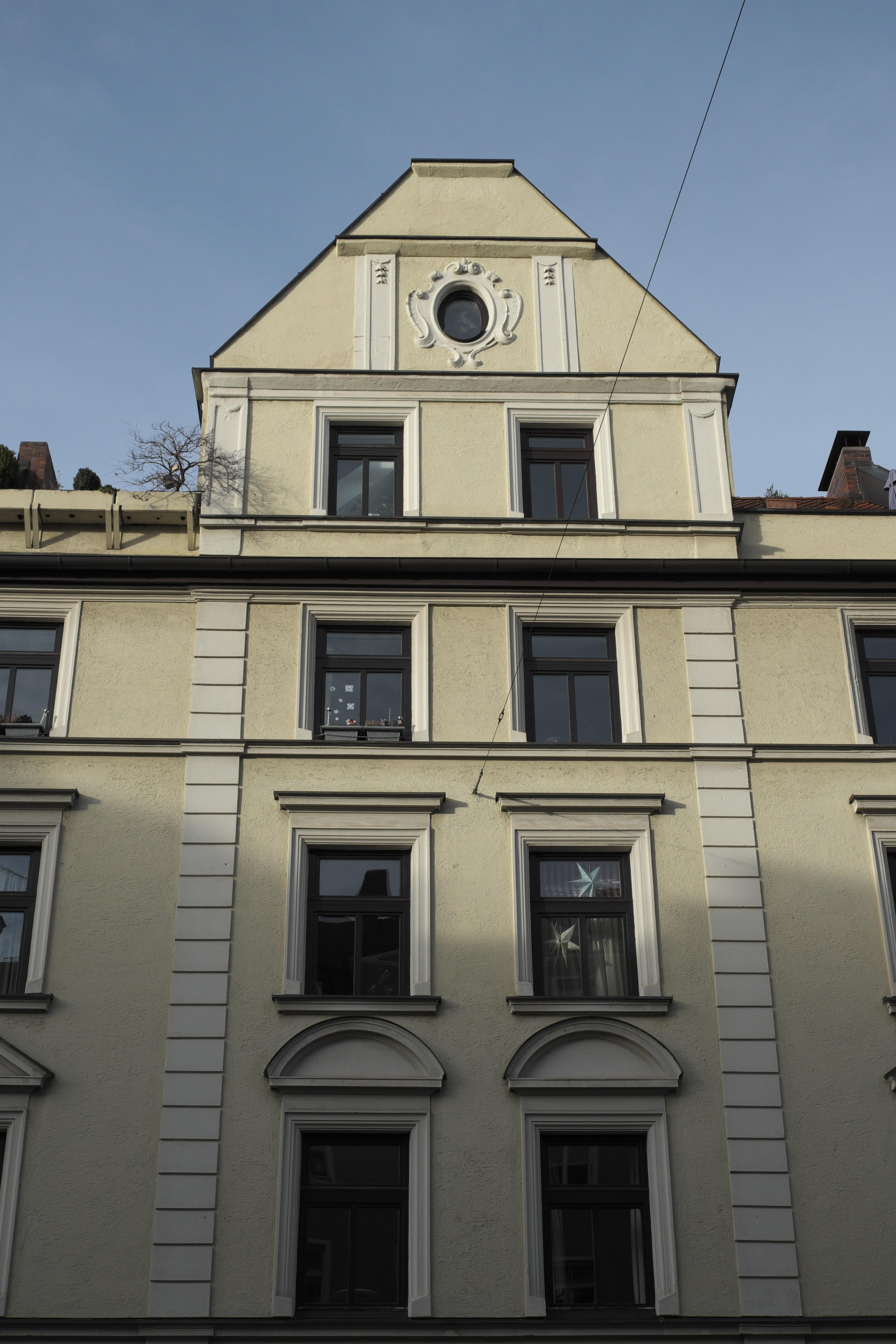 Mietshaus in der Volkartstraße 18 in Neuhausen im Stadtbezirk Neuhausen-Nymphenburg in München (Bayern/Deutschland), 1898 von Ludwig Catharinus erbaut